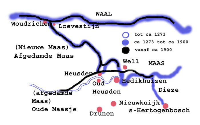 rivierlopen in de tijd